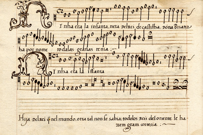 Canção "Ninha era la infanta", composição anónima no Cancioneiro de Lisboa. A infanta em questão é Beatriz de Portugal, Duquesa de Saboia. Esta composição foi em 1521 usada por Gil Vicente no Auto das Cortes de Júpiter para celebrar a partida da mesma infanta.